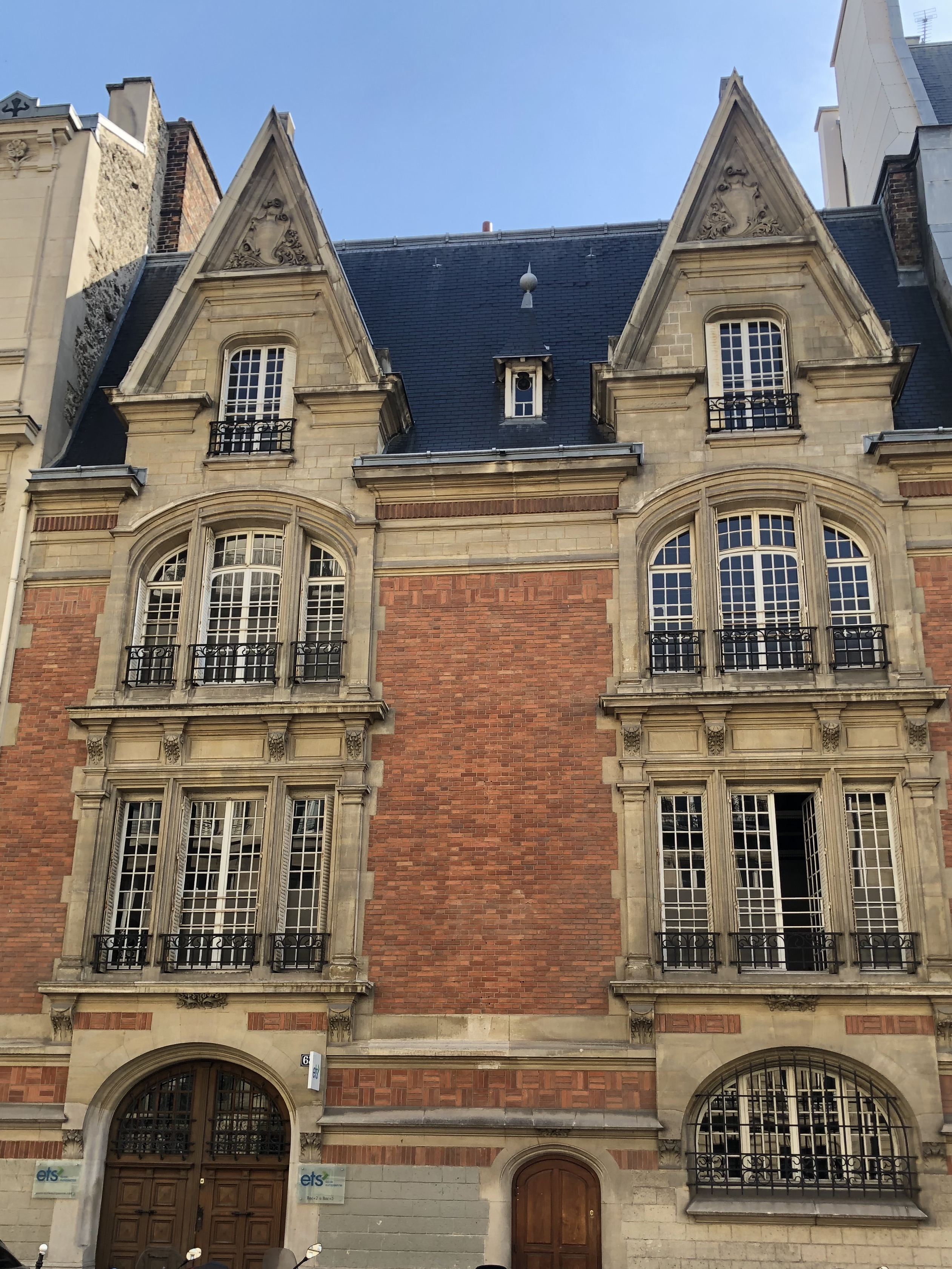 Hôtel particulier XIXème siècle de style néo-Louis XIII, au 63 rue Ampère, Paris 17ème